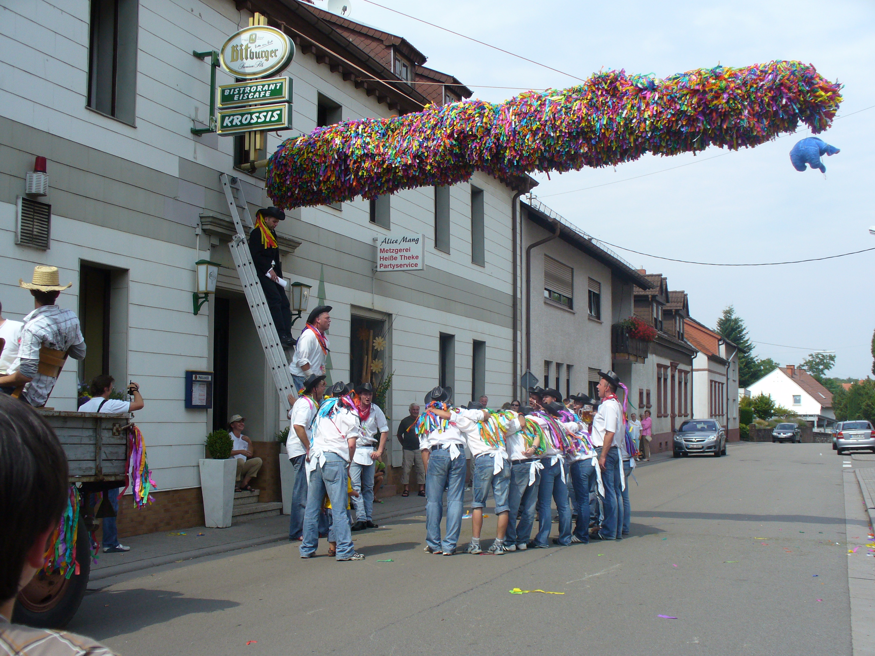 Kerwestrauß und Straußbuwe an der Schopper Kerwe 2008